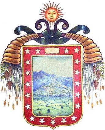 Escudo de Churintzio